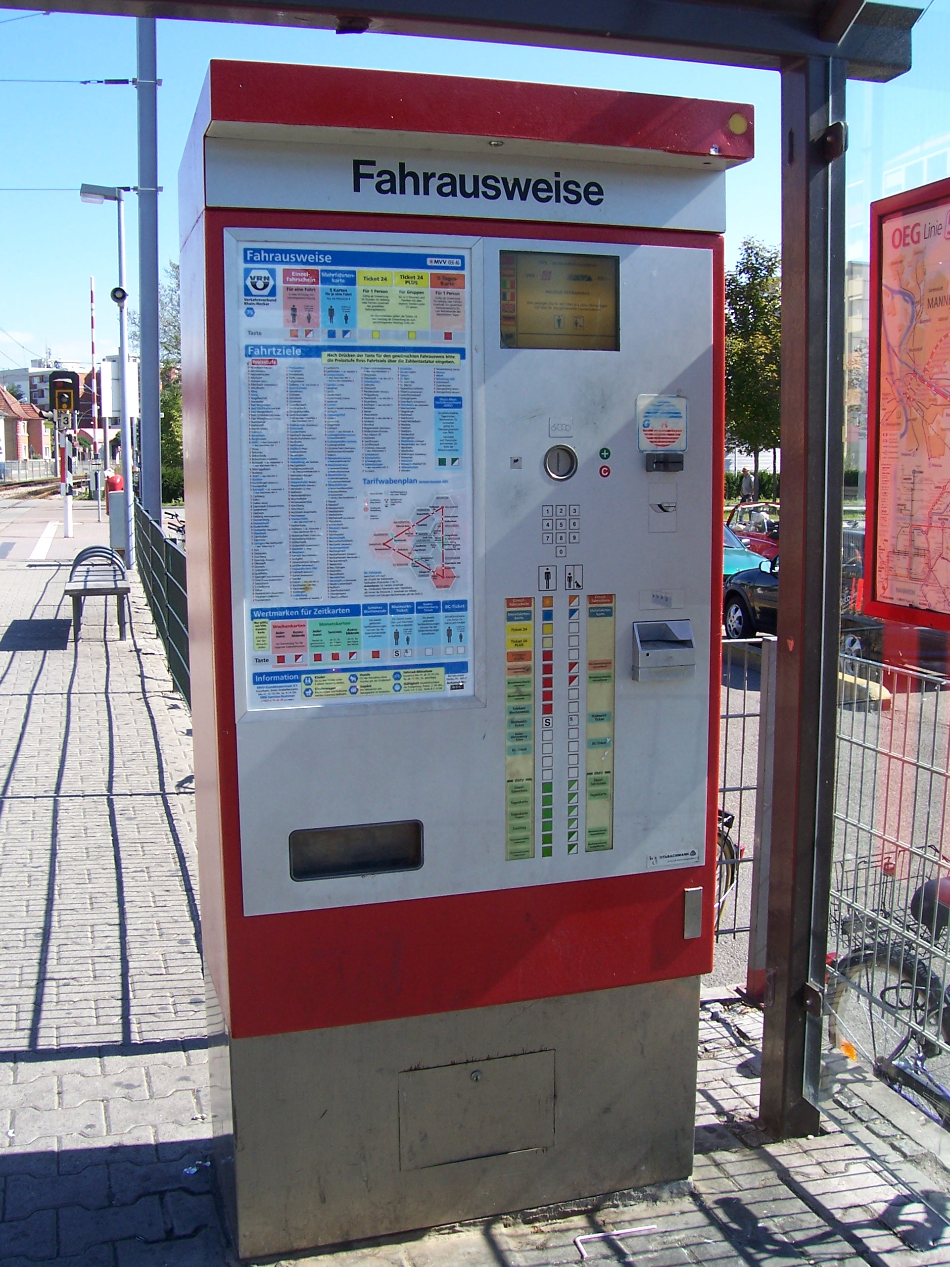 Ein Fahrscheinautomat der MVV OEG AG an der Haltestelle Viernheim Tivoli